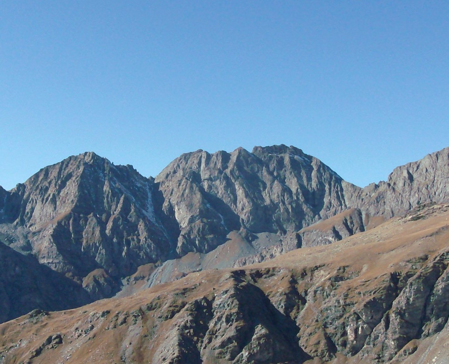 Le rocce Fourioun e punta Venezia viste dalla punta Sea Bianca. Da sinistra si distinguono: il colle del coulour del Porco; il triangolo di punta Venezia; il colle del coulour bianco; la cresta allungata delle rocce Fourioun; il colle delle Traversette.